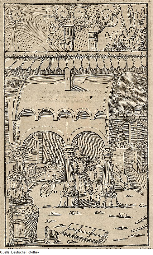 Original image description from the Deutsche Fotothek Bergwerk & Bergbau & Verhüttung & Hüttenwesen & Schmelzofen